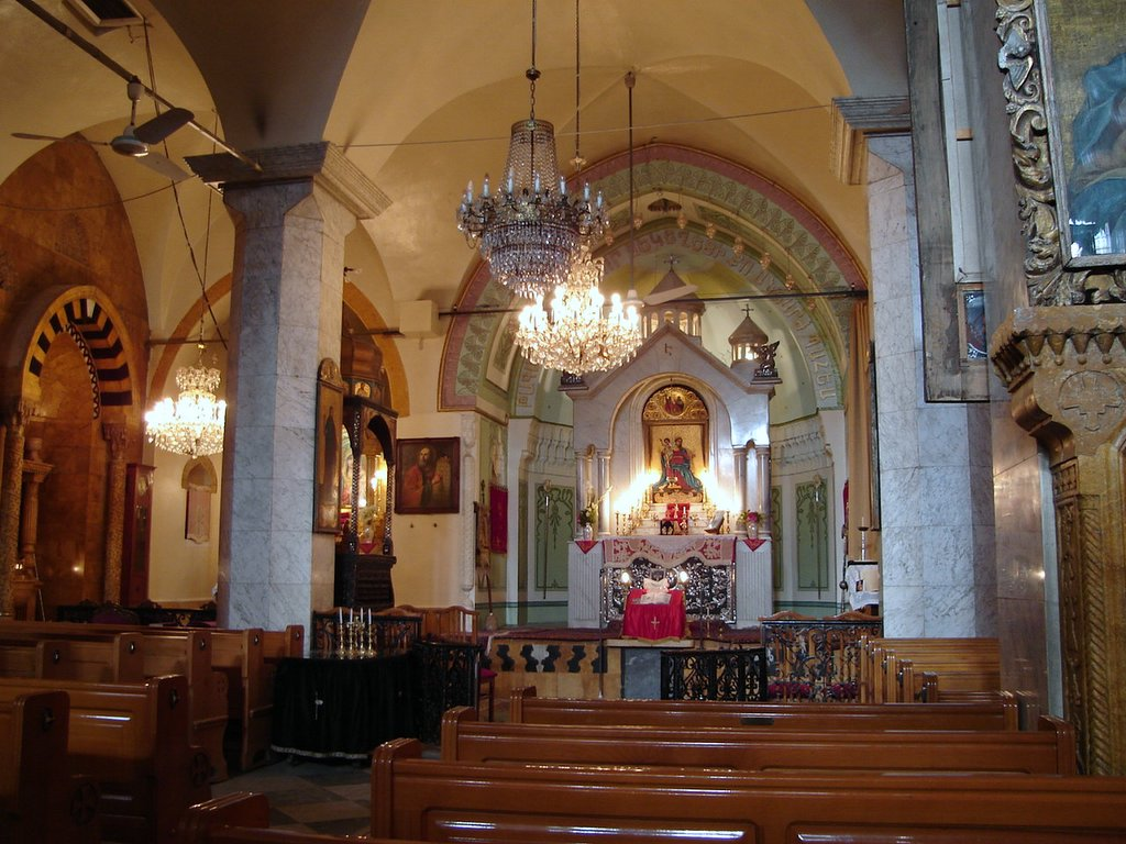 Syria. Aleppo.